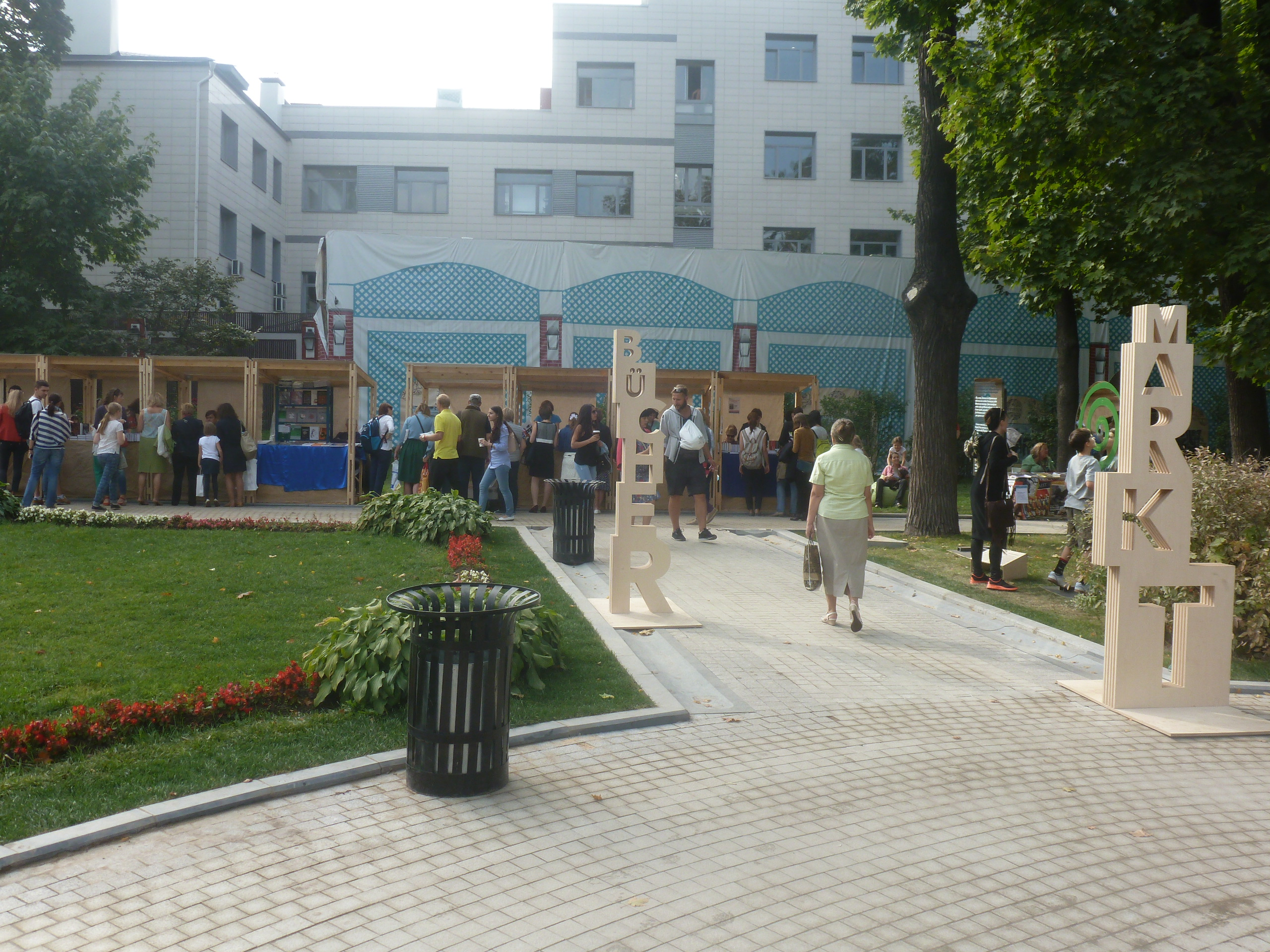 Festivalo de germana lingvo en Moskvo, Rusio, en jaro 2014.